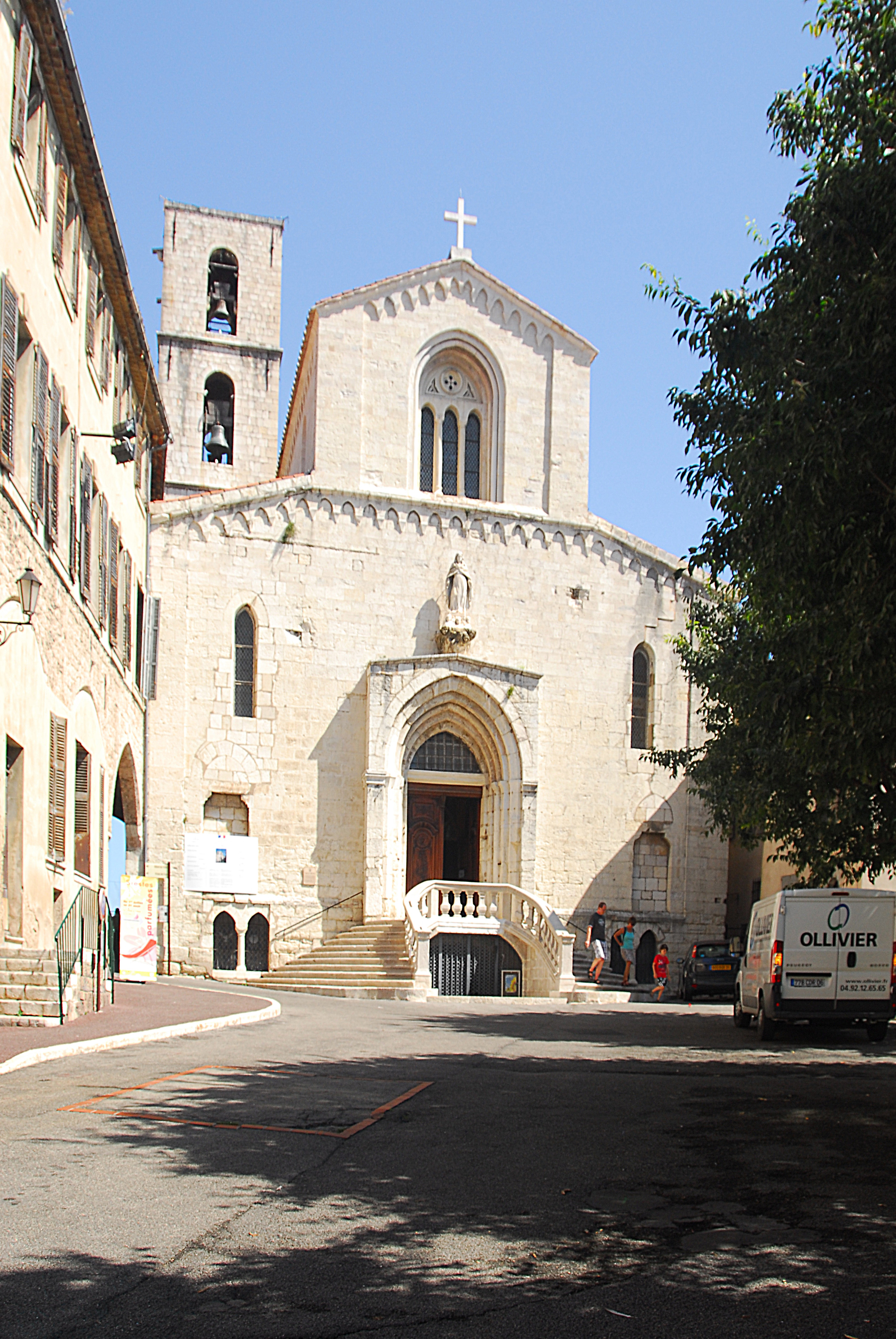 Kathédrale Notre-Dame-du-Puy von Grasse.